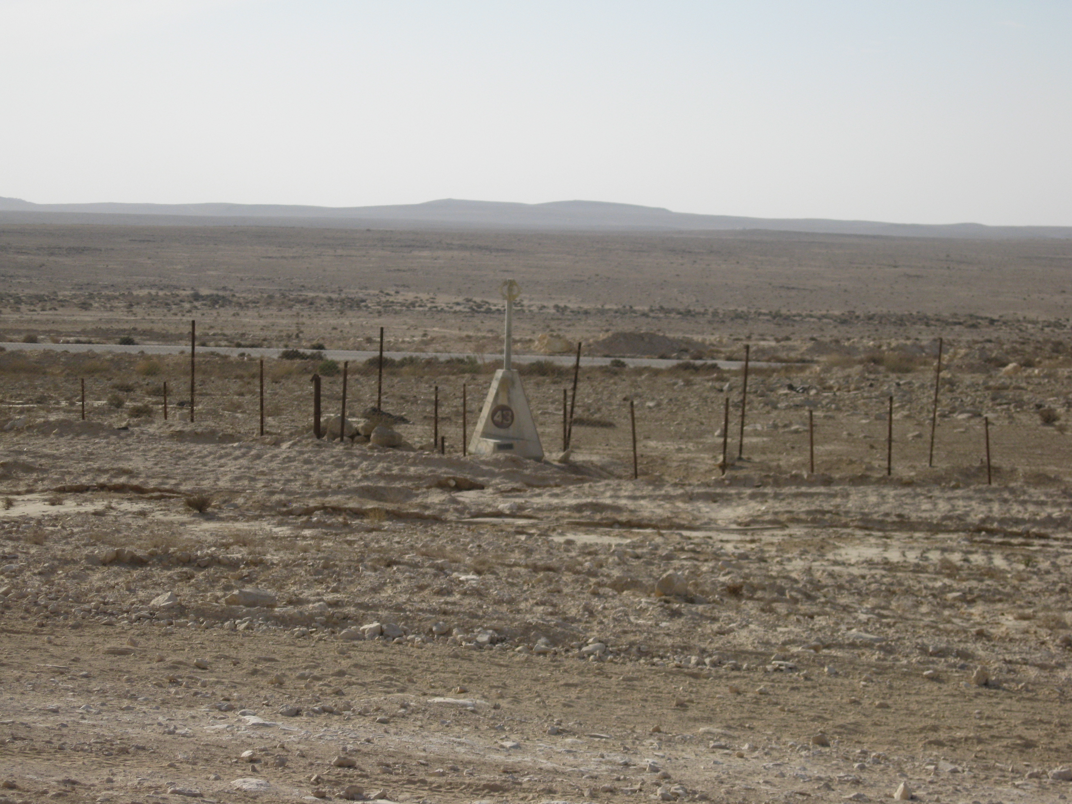 אבן גבול מס' 43 בגבול ישראל מצרים